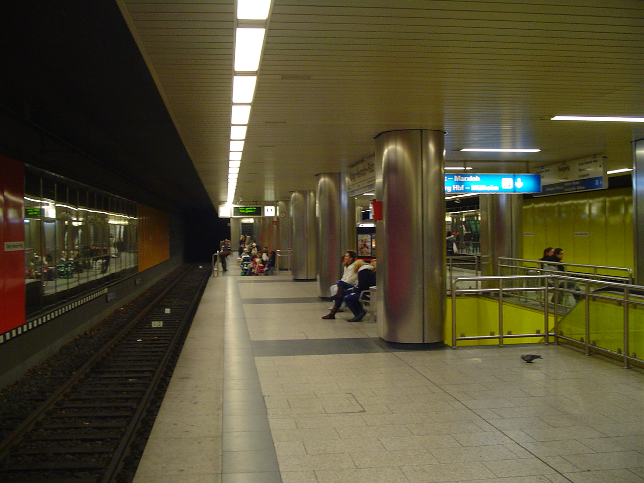 Stadtbahnnetz Rhein-Ruhr, Station Duisburg König-Heinrich-Platz